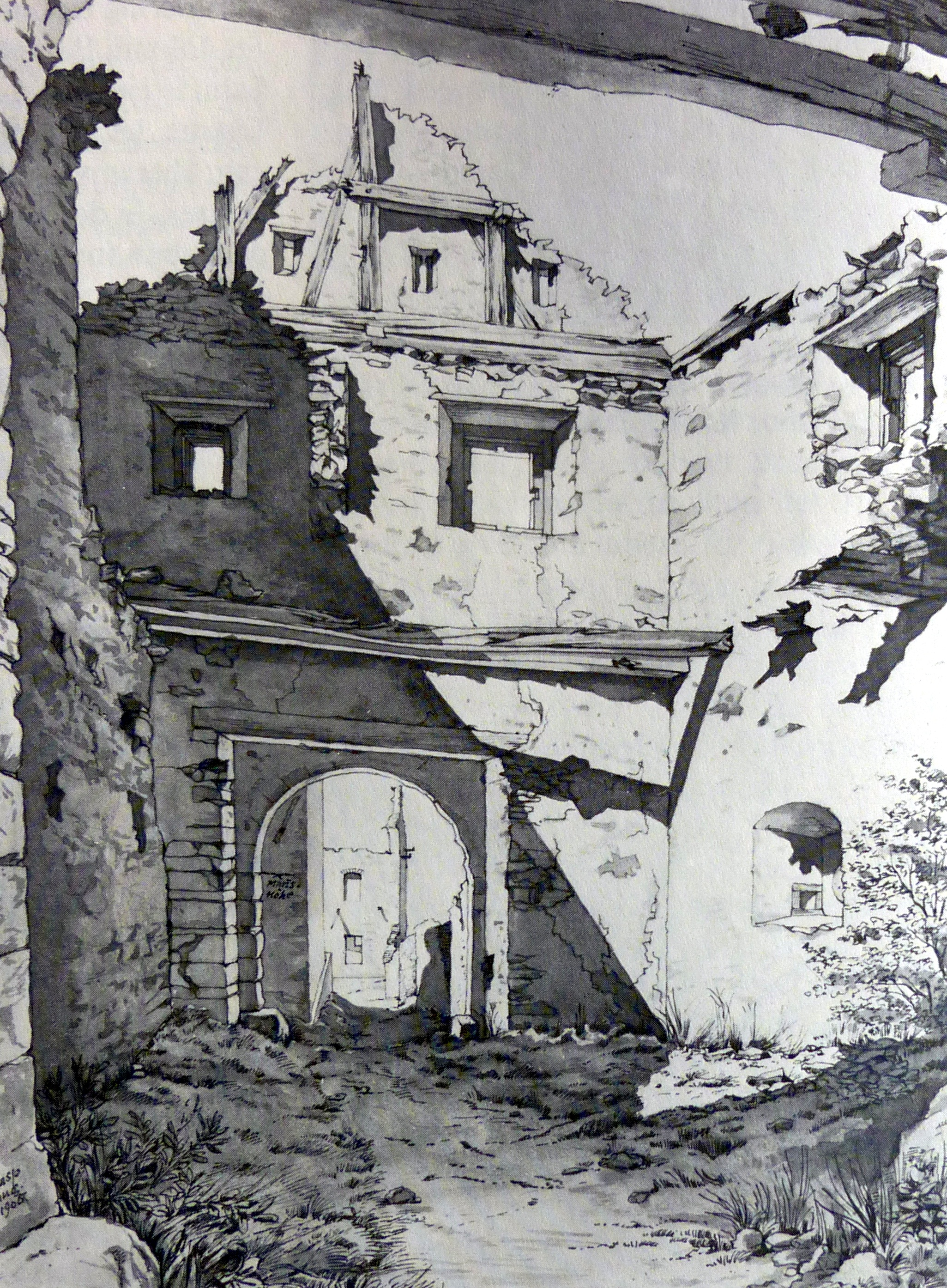 Schloss Tarasp: Inneres des Torhauses um 1904, nach J.R. Rahn